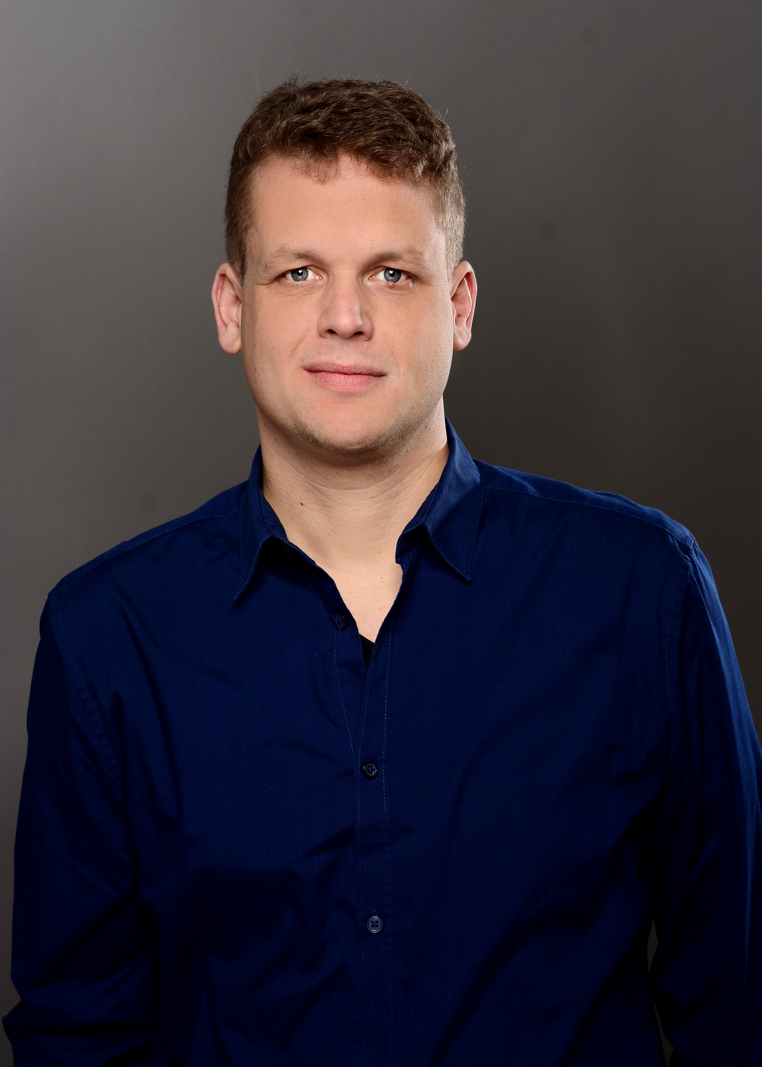 Foto Sönke Andresen